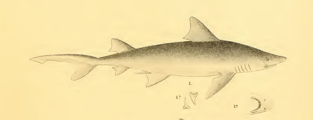 Акула рода большеглазых акул Hemipristis elongata syn. Carcharias ellioti